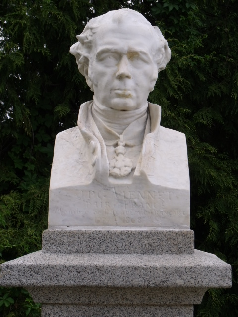 Buste de Jean-Pons-Guillaume Viennet au Plateau des poètes à Béziers, œuvre de Jean-Antoine Injalbert (1884)